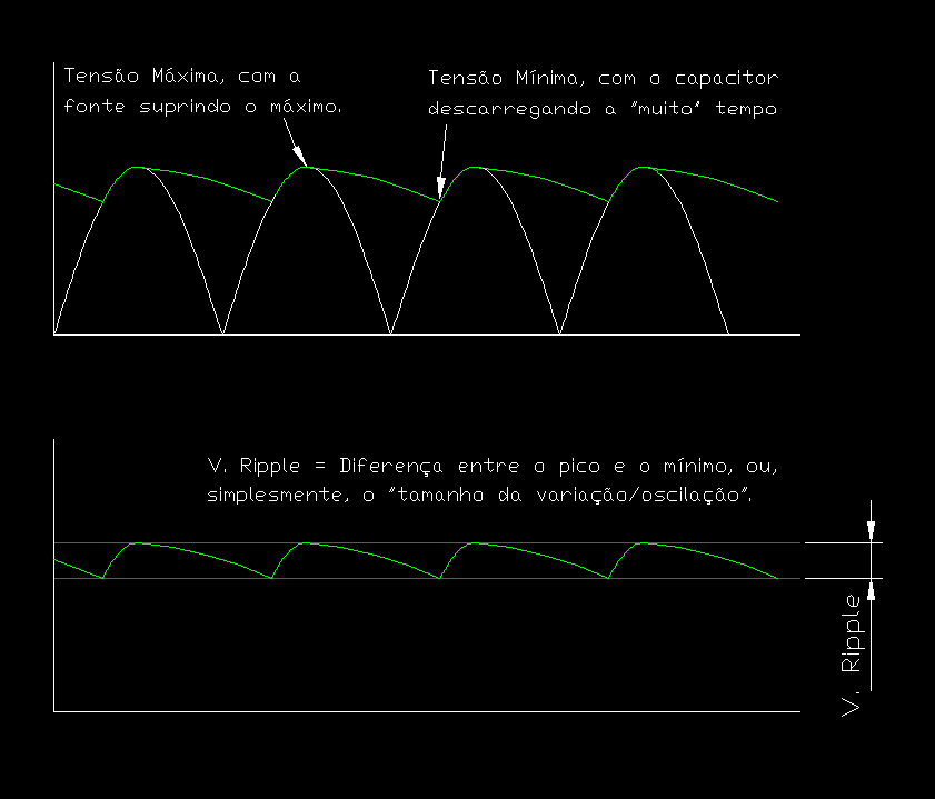 Gráfico da curva característica de uma ondulação de Ripple em um circuito retificador de onda completa.